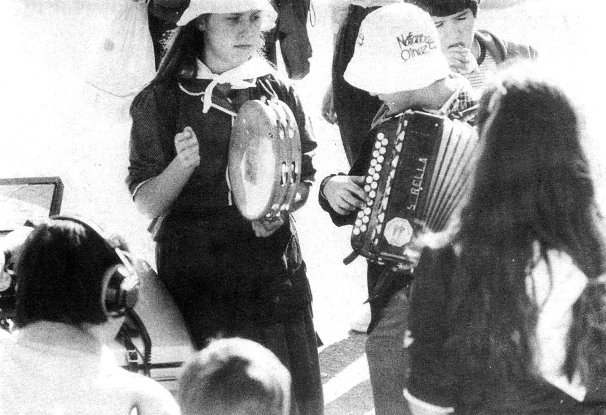 Nafarroa oinez 83, ibilbideko ikuskizunak